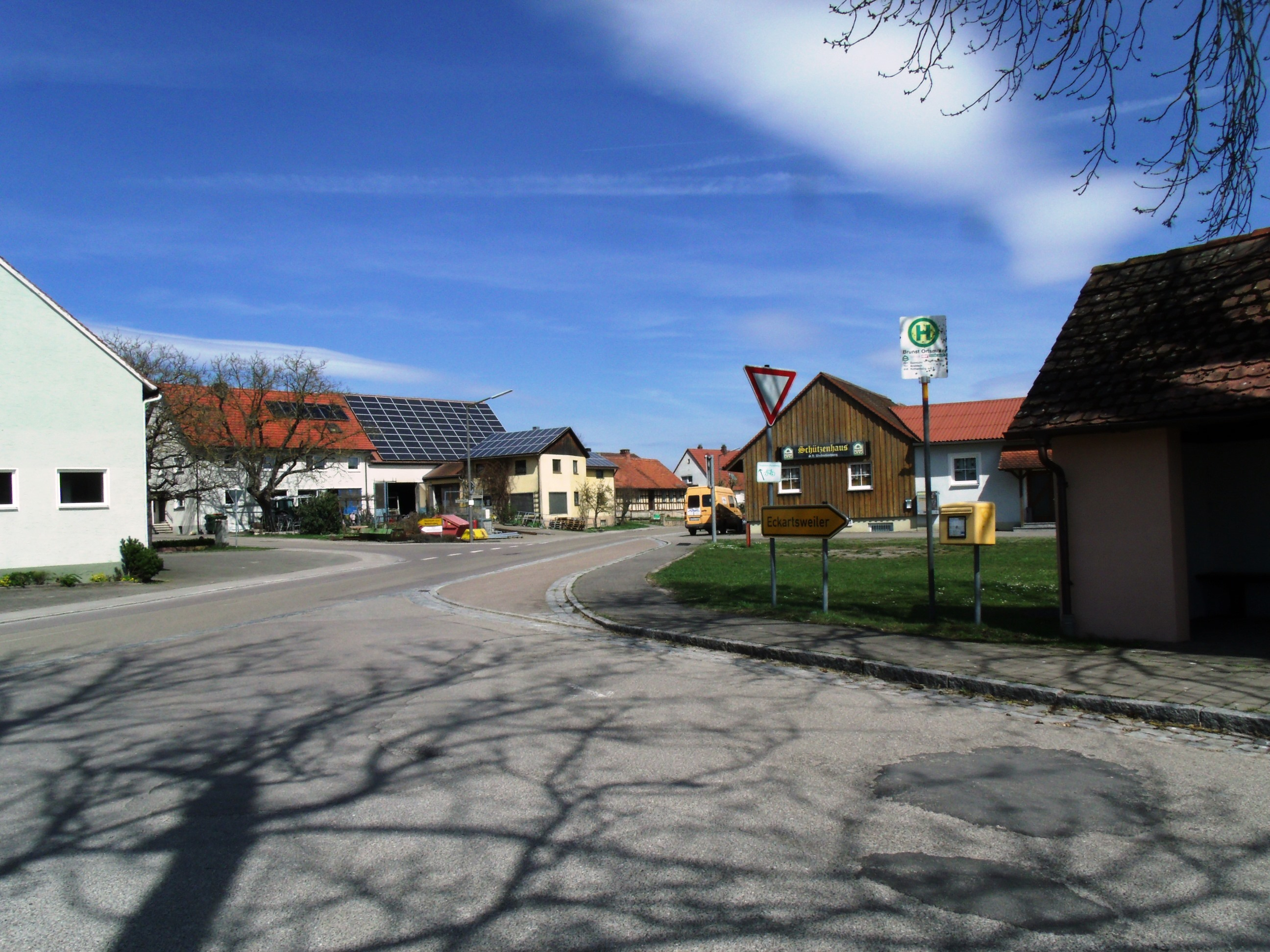 Brunst, Ortsteil von Leutershausen im Landkreis Ansbach